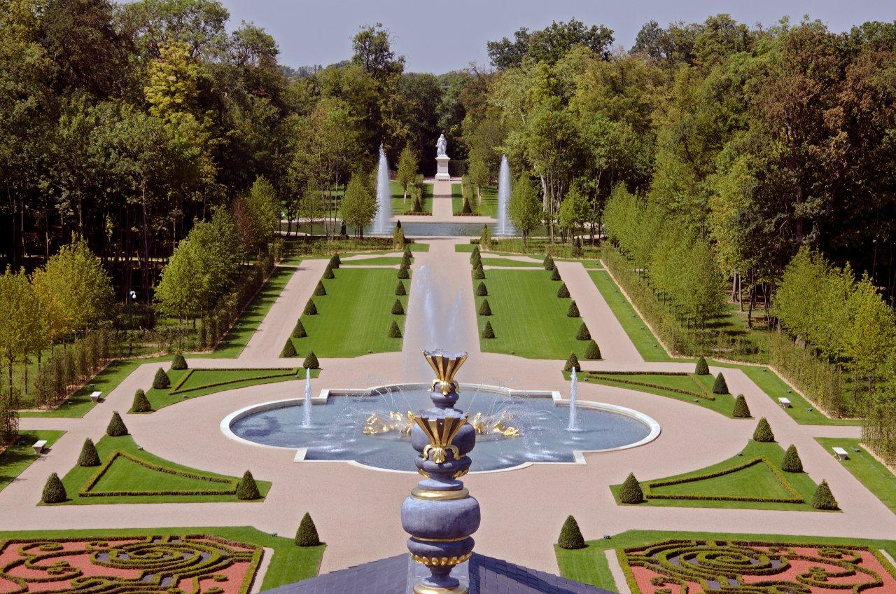 Château Louis XIV — Louveciennes. Jardins